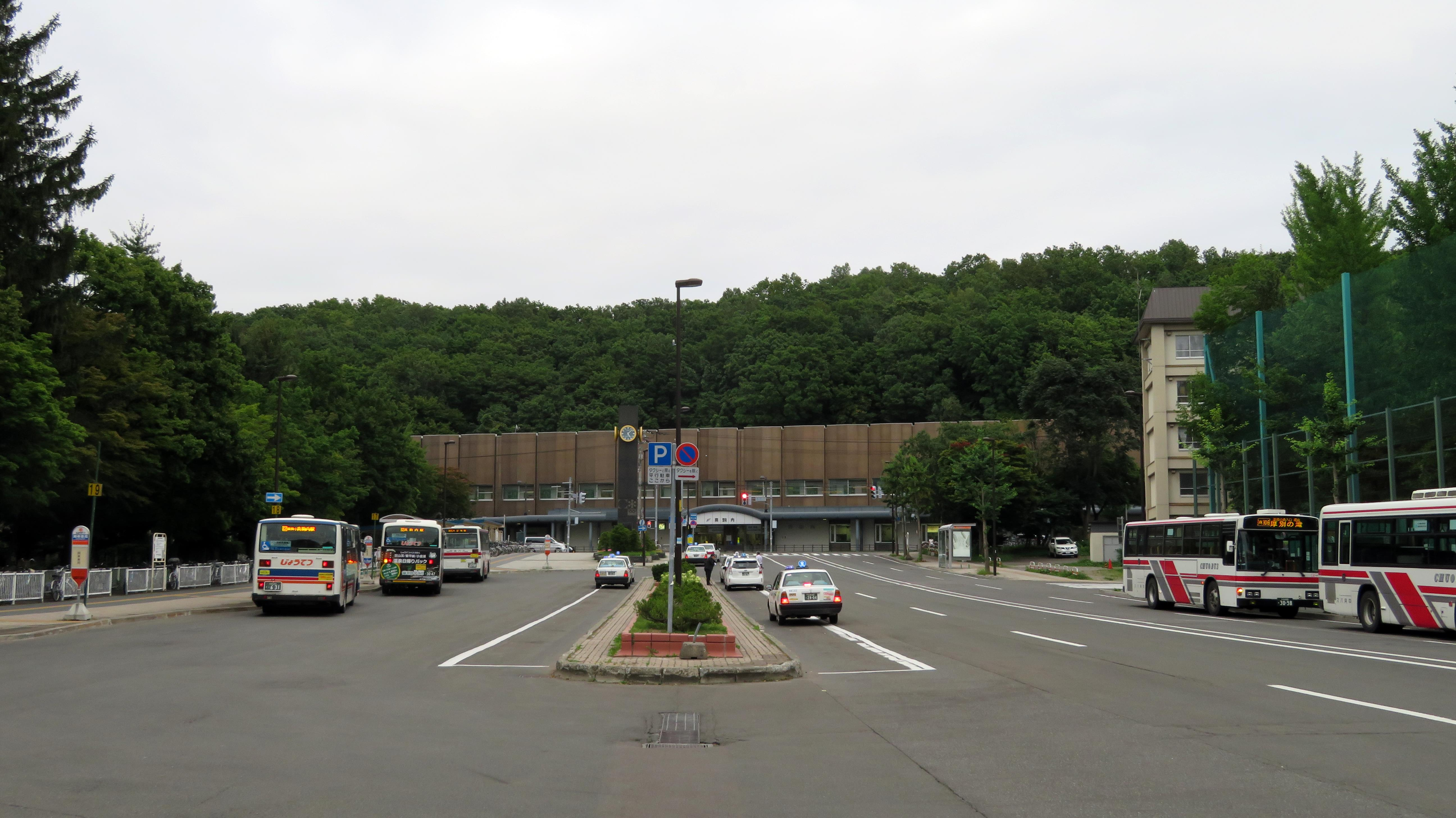 真駒内駅前バス・タクシー乗り場 Canon PowerShot SX720 HS